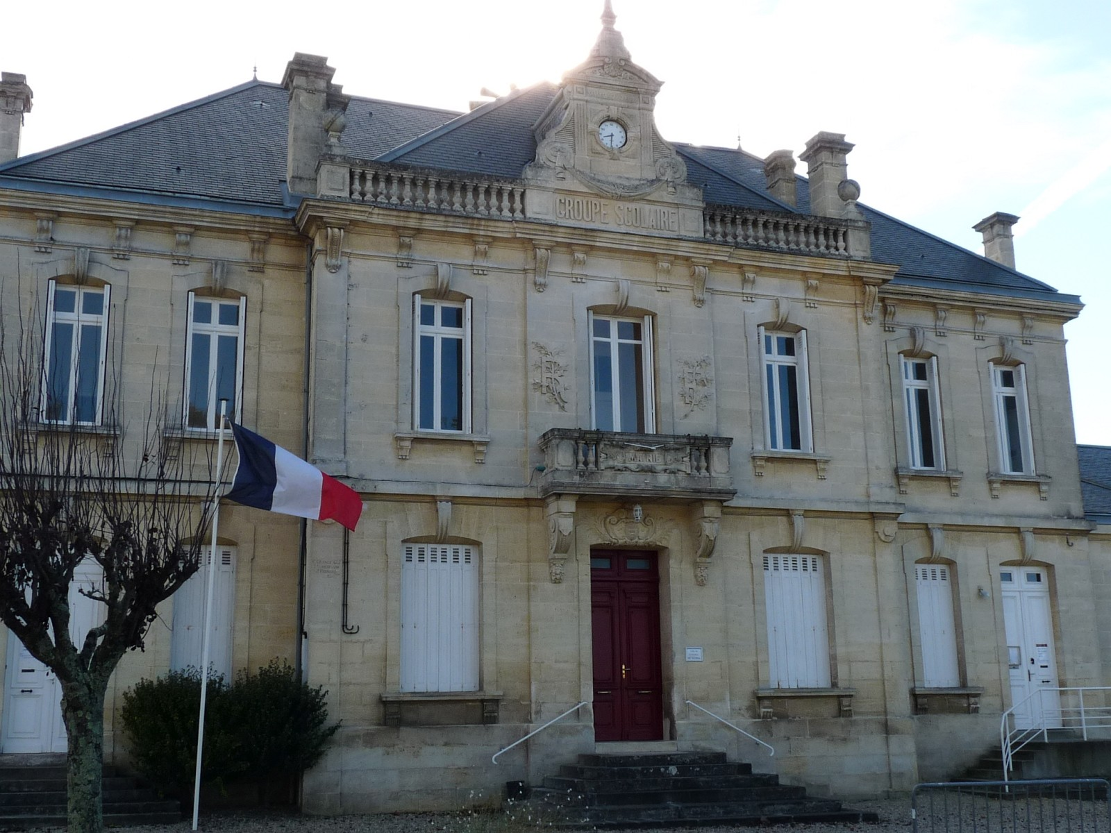 Mairie de Berson, Gironde, France